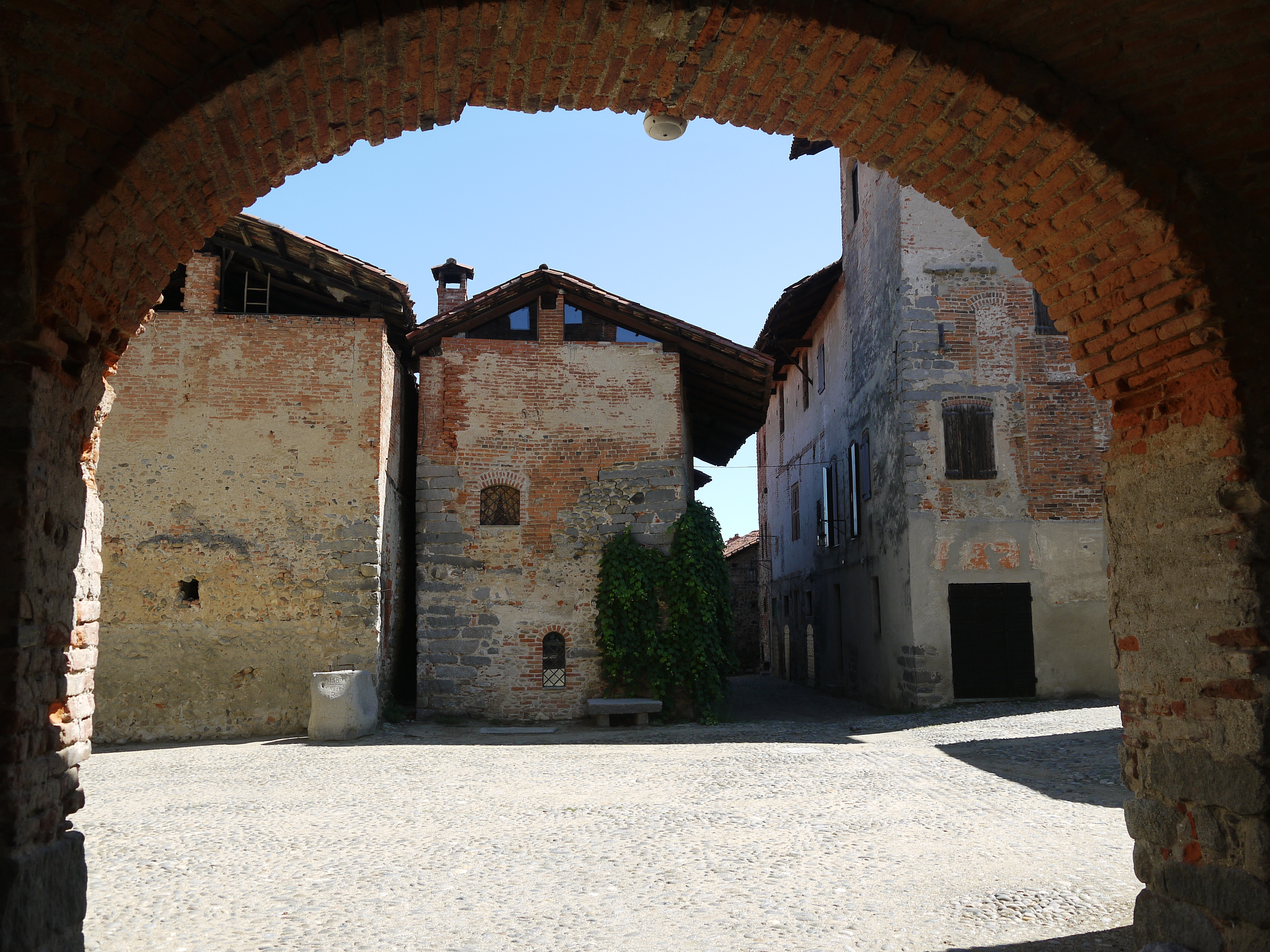 Ricetto medievale di Candelo (spazi esterni dentro e fuori le mura) This is a photo of a monument which is part of cultural heritage of Italy.